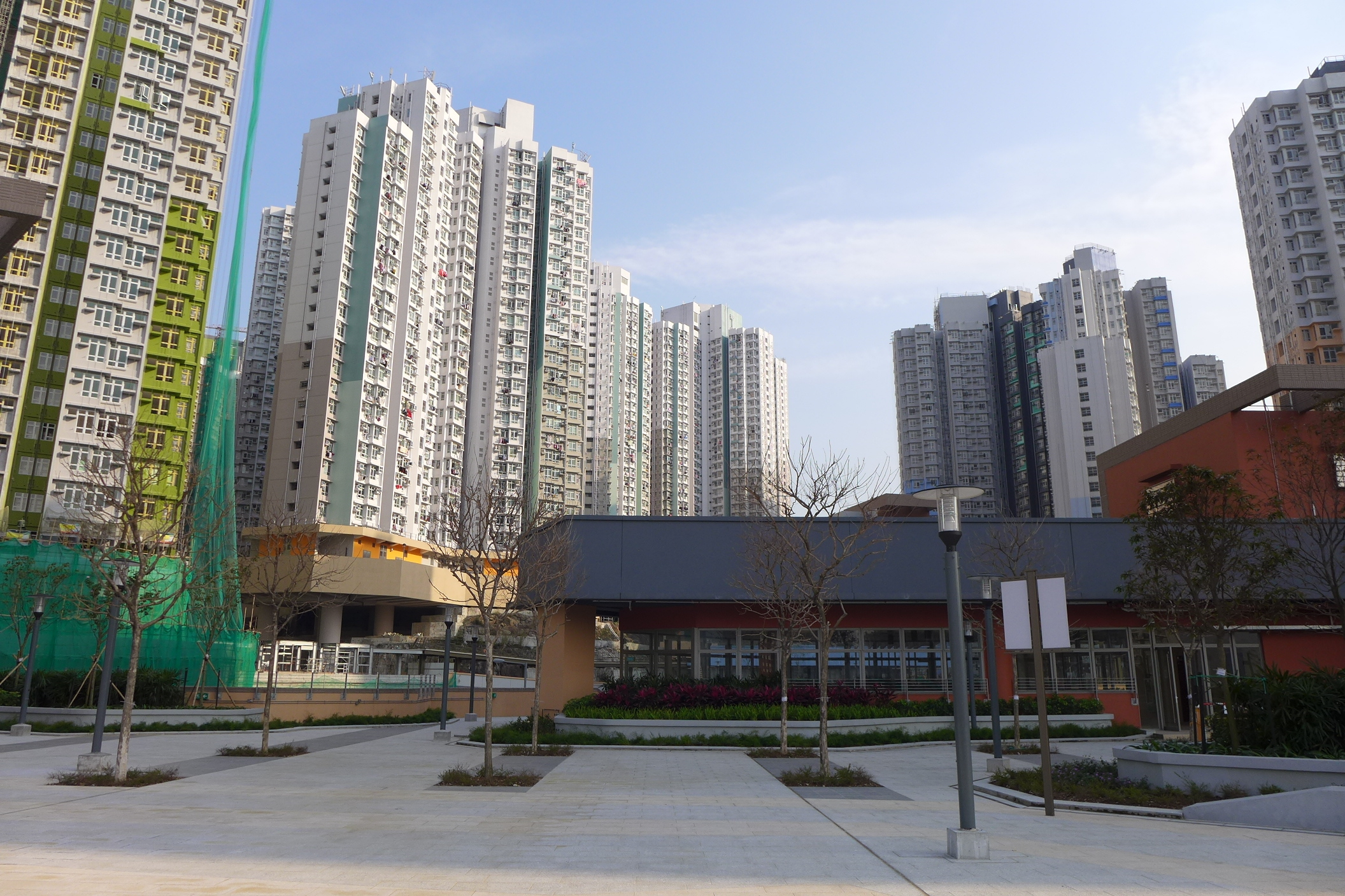 Shui Chuen O Estate